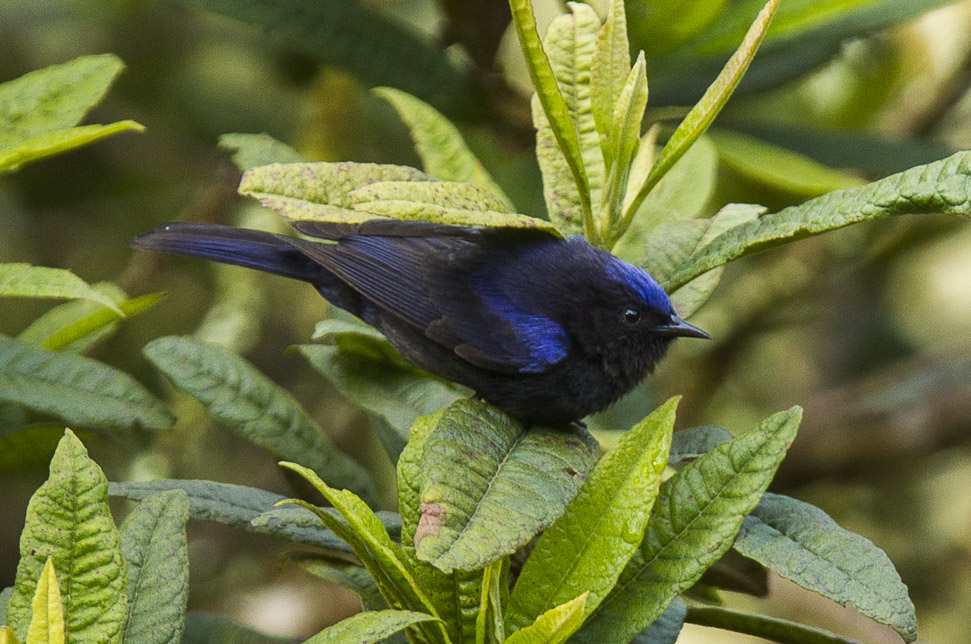 Capped Conebill - Ecuador_S4E4700